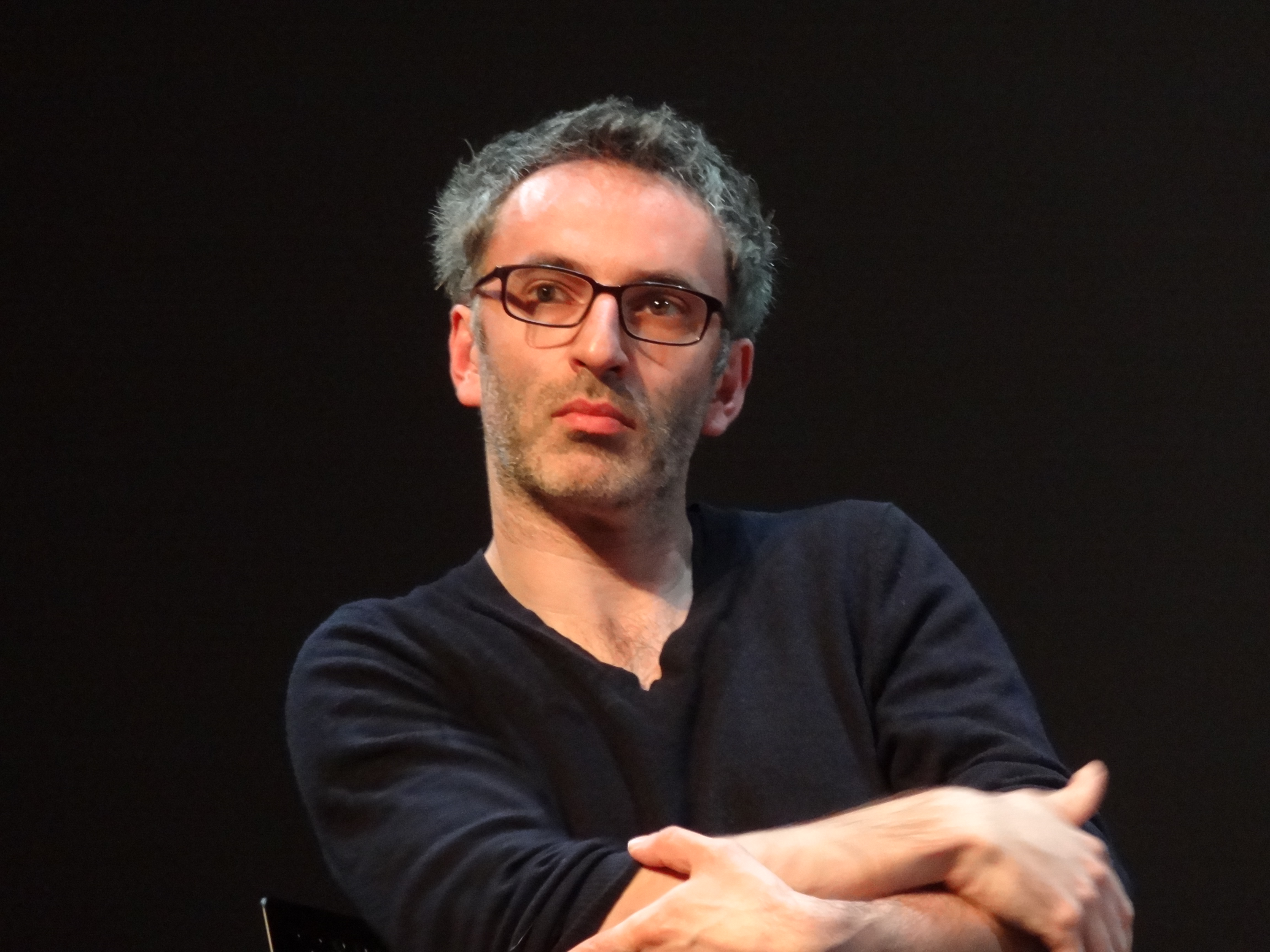 Vincent Delerm au Centre Georges Pompidou